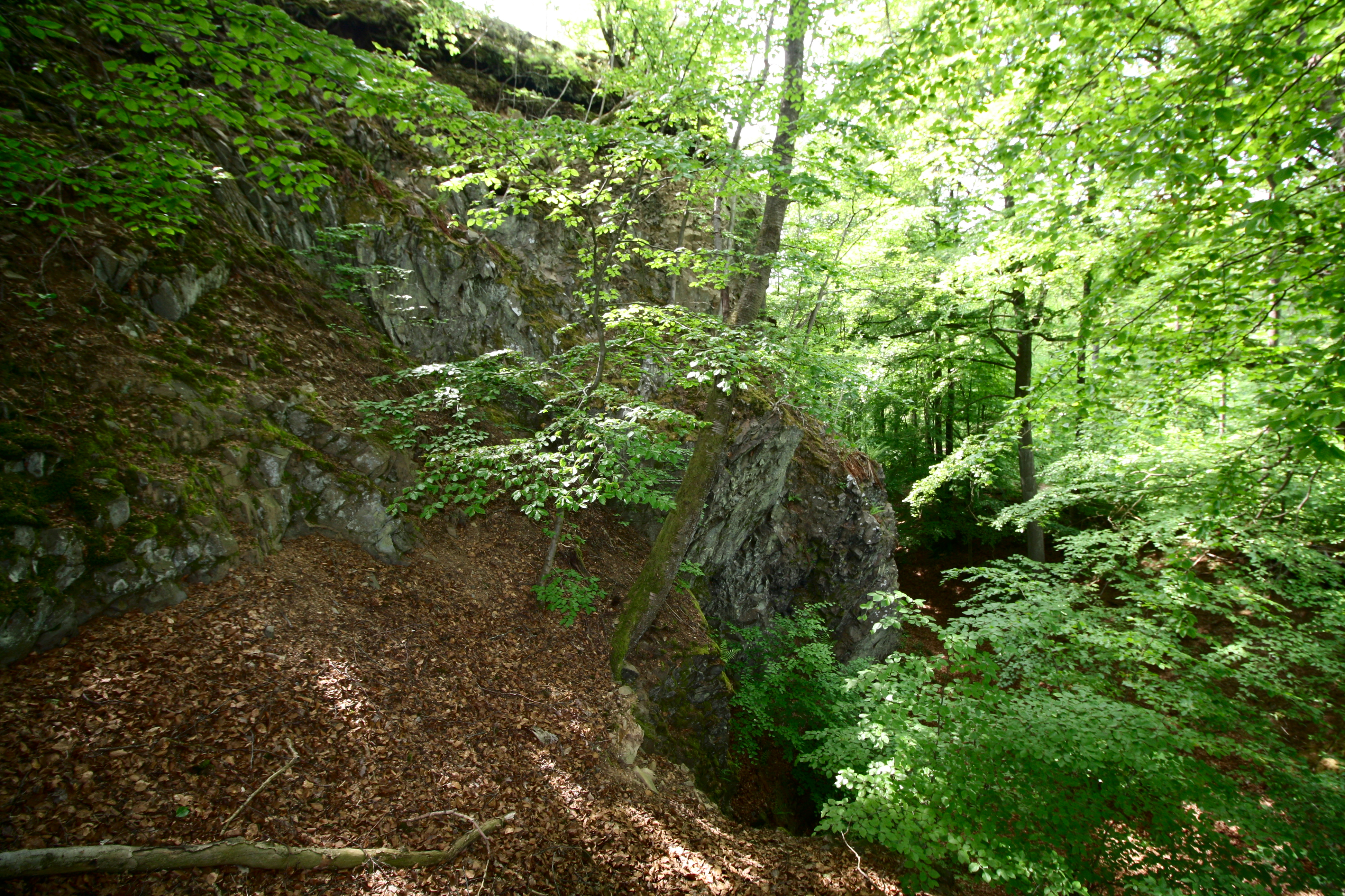 Felsengruppe Bühl, Naturdenkmal in Hilgert, Westerwald, Rheinland-Pfalz, Deutschland